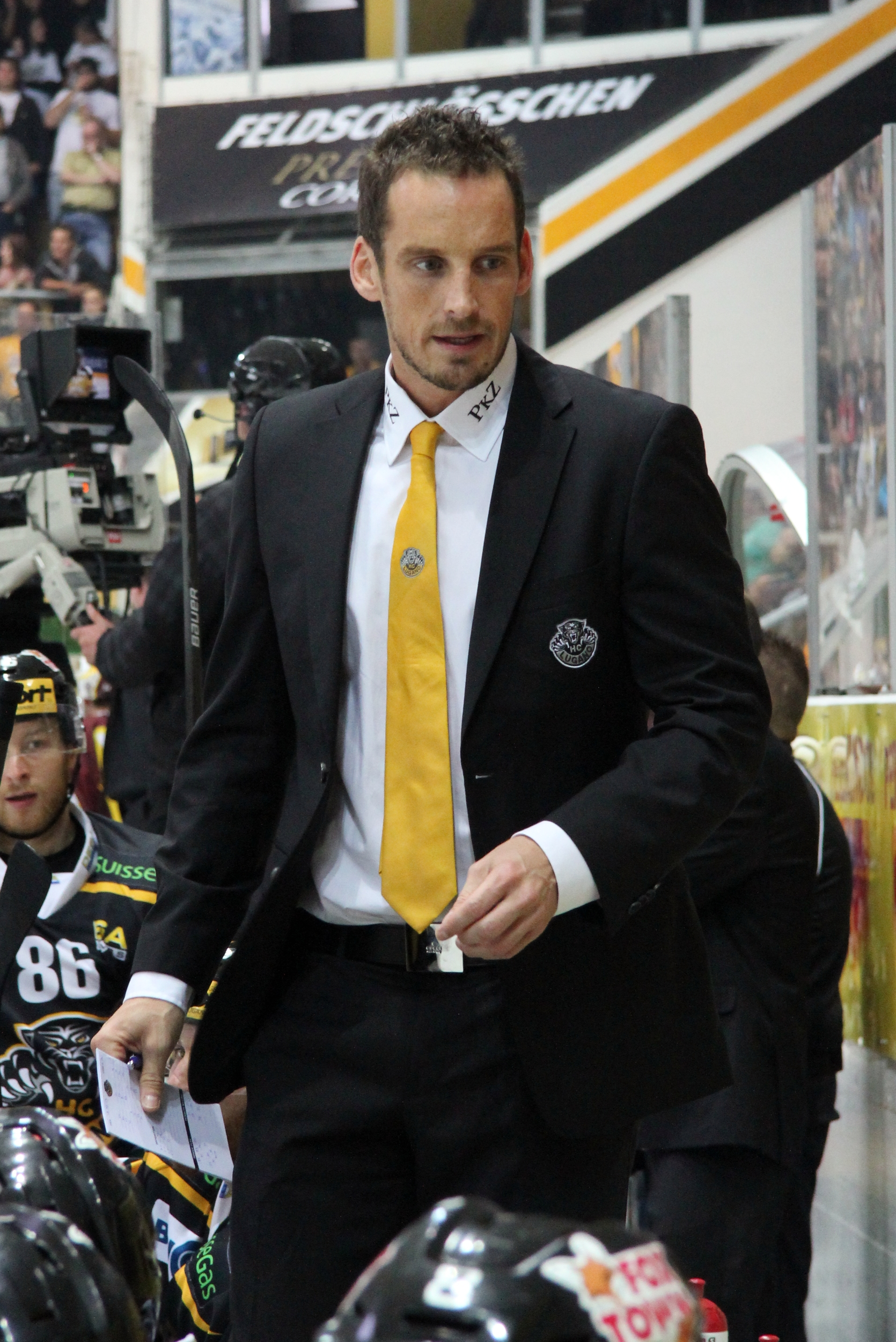 Patrick Fischer (L Head coach).